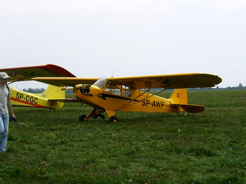 Samolot Piper CUB, należący do Marka Masalskiego z Aeroklubu Warszawskiego, sfotografowany 10.09.2005 roku podczas pikniku lotniczego z okazji 50 - lecia Aeroklubu Gliwickiego. Autor:Michał"Hans Kloss" Gliwice.